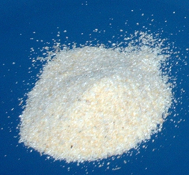 Rheintaler Ribel Corn